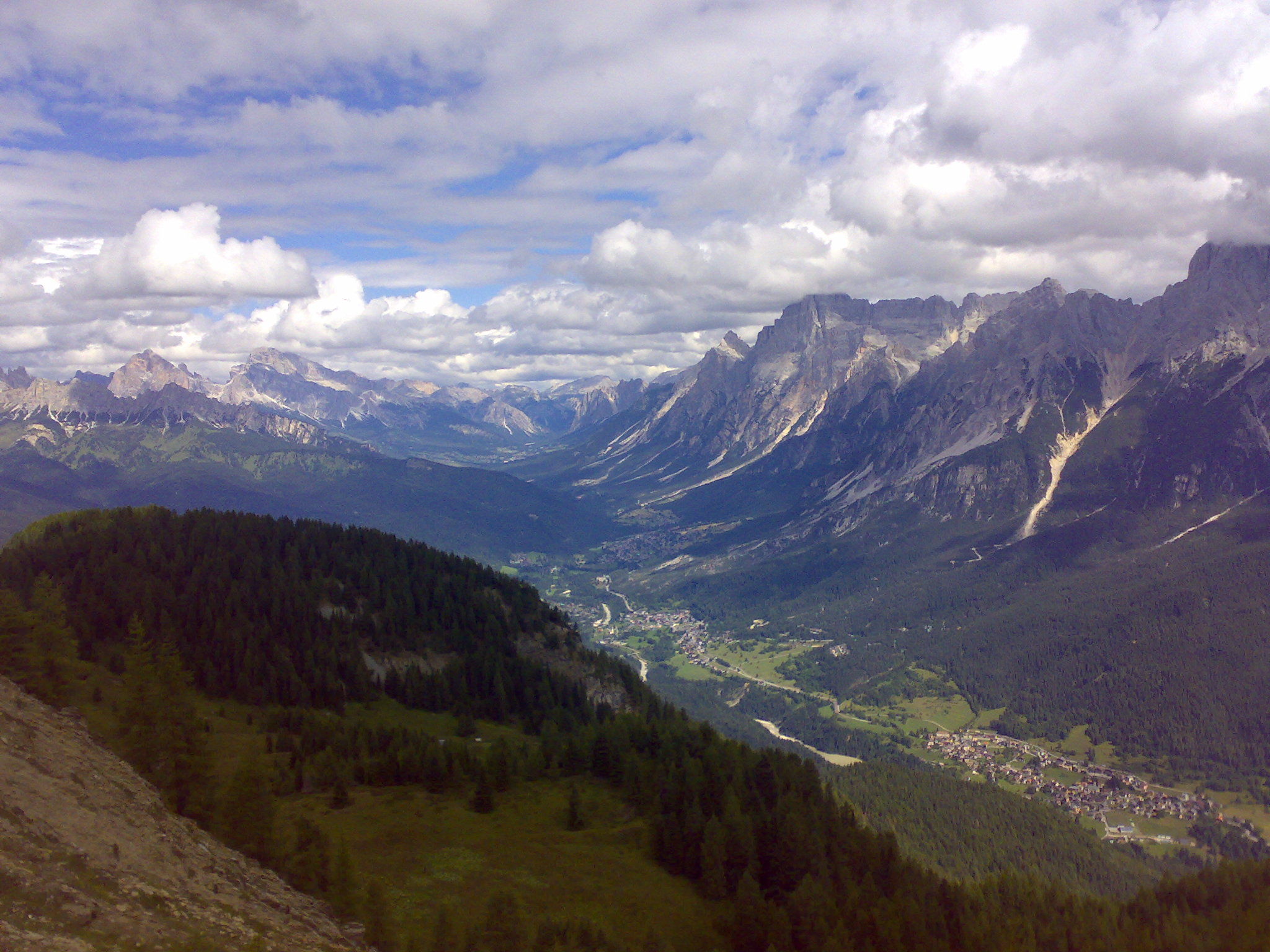 La Valle del Boite